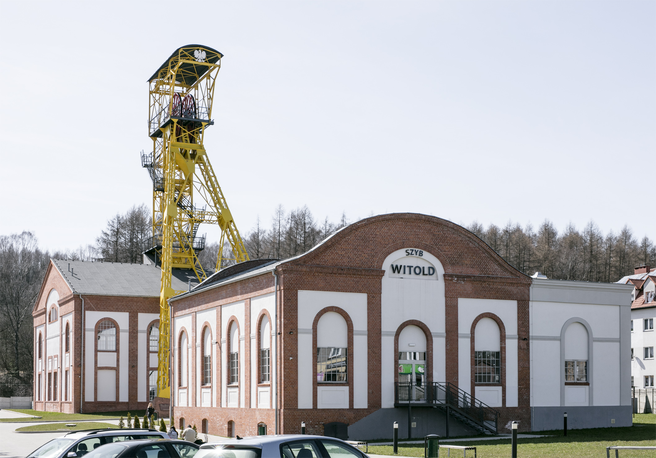 Niederschlesien Bergwerk Victoria Anlage Withold